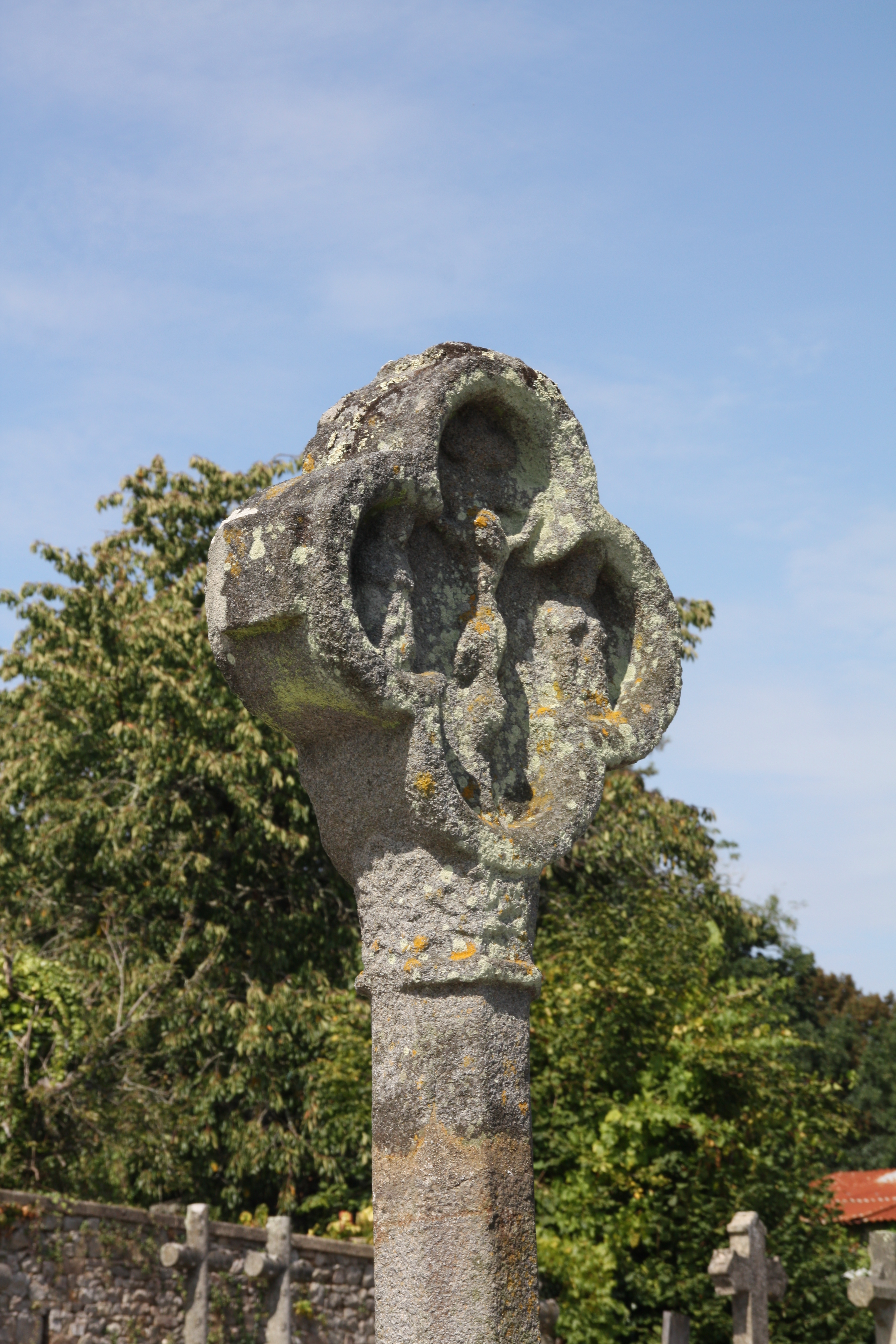 Croix quadrilobée du cimetière de Bain-de-Bretagne